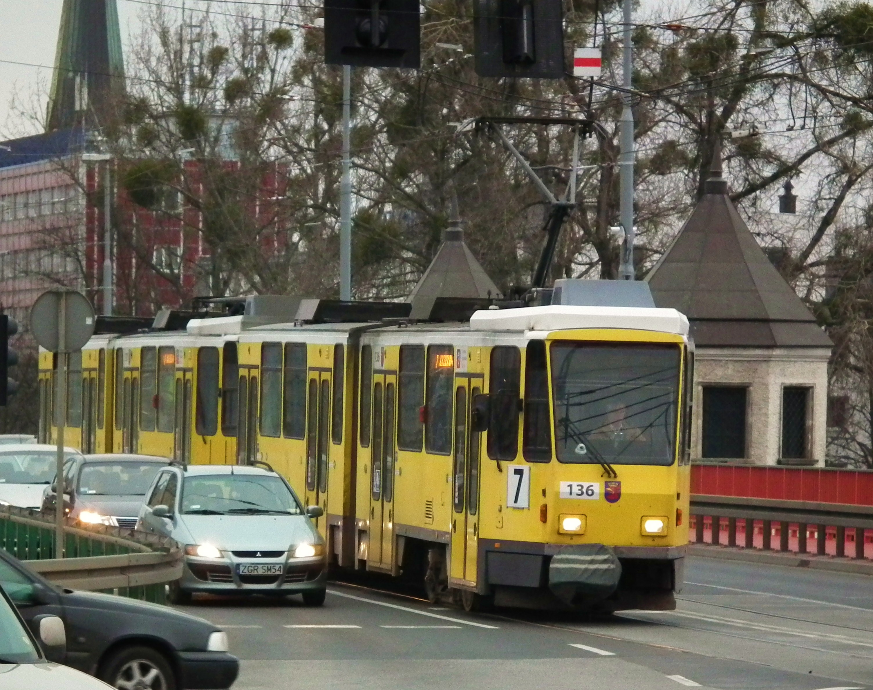 Tatra KT4 w Szczecinie. Most Długi.